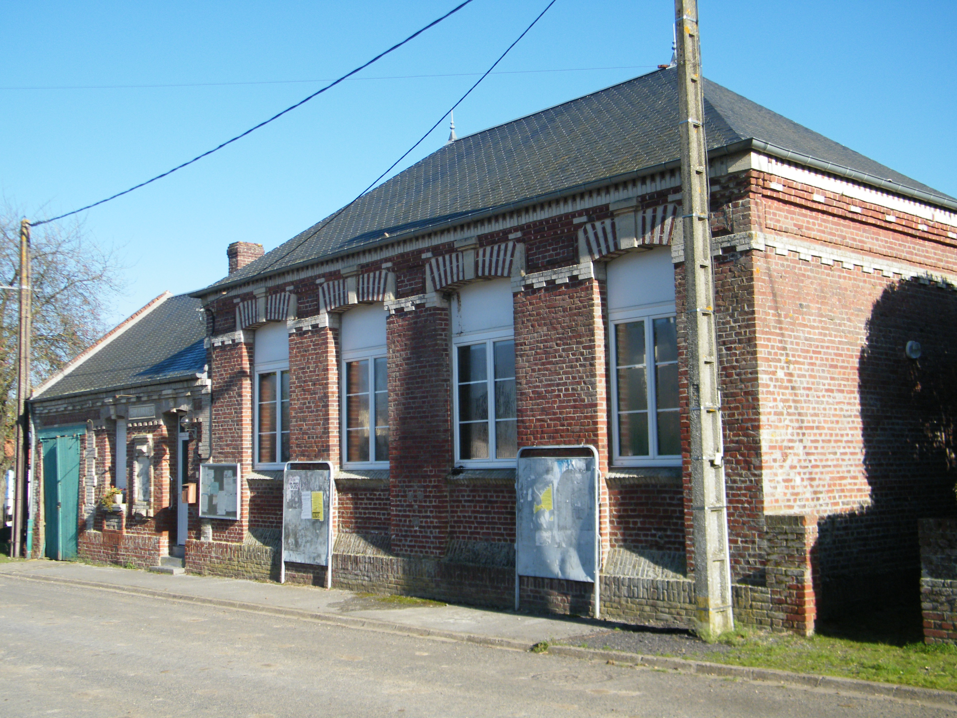 Bâtiments communaux.